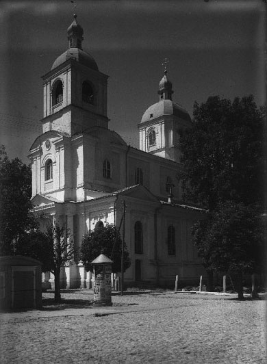 Беларуская (тарашкевіца): Пінск (Pinsk), вуліца Дамініканская (vulica Daminikanskaja). Касьцёл Сьвятога Дамініка